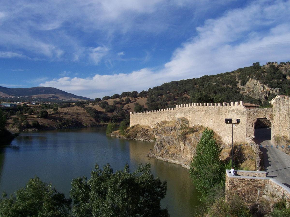 El embalse de Puentes Viejas está situado en el curso medio del río Lozoya, en la Sierra de Guadarrama (Comunidad de Madrid). Pertenece a la red de embalses del Canal de Isabel II y es el tercer embalse en el sentido de la corriente que se encuentra el río a su paso, siendo su superficie máxima de 292 hectáreas.